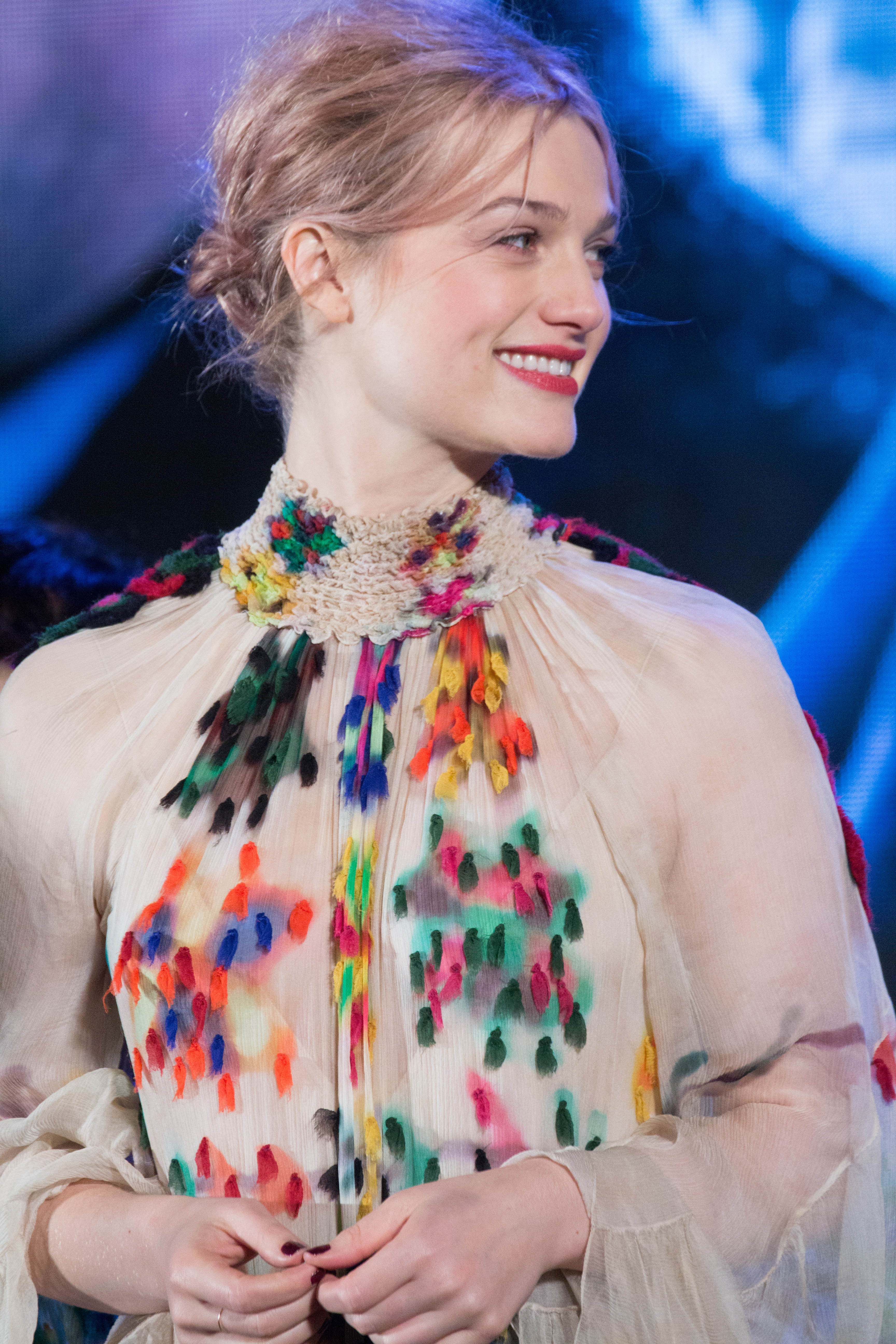 ファンタスティック・ビーストと魔法使いの旅 ジャパン・プレミア レッドカーペット アリソン・スドル